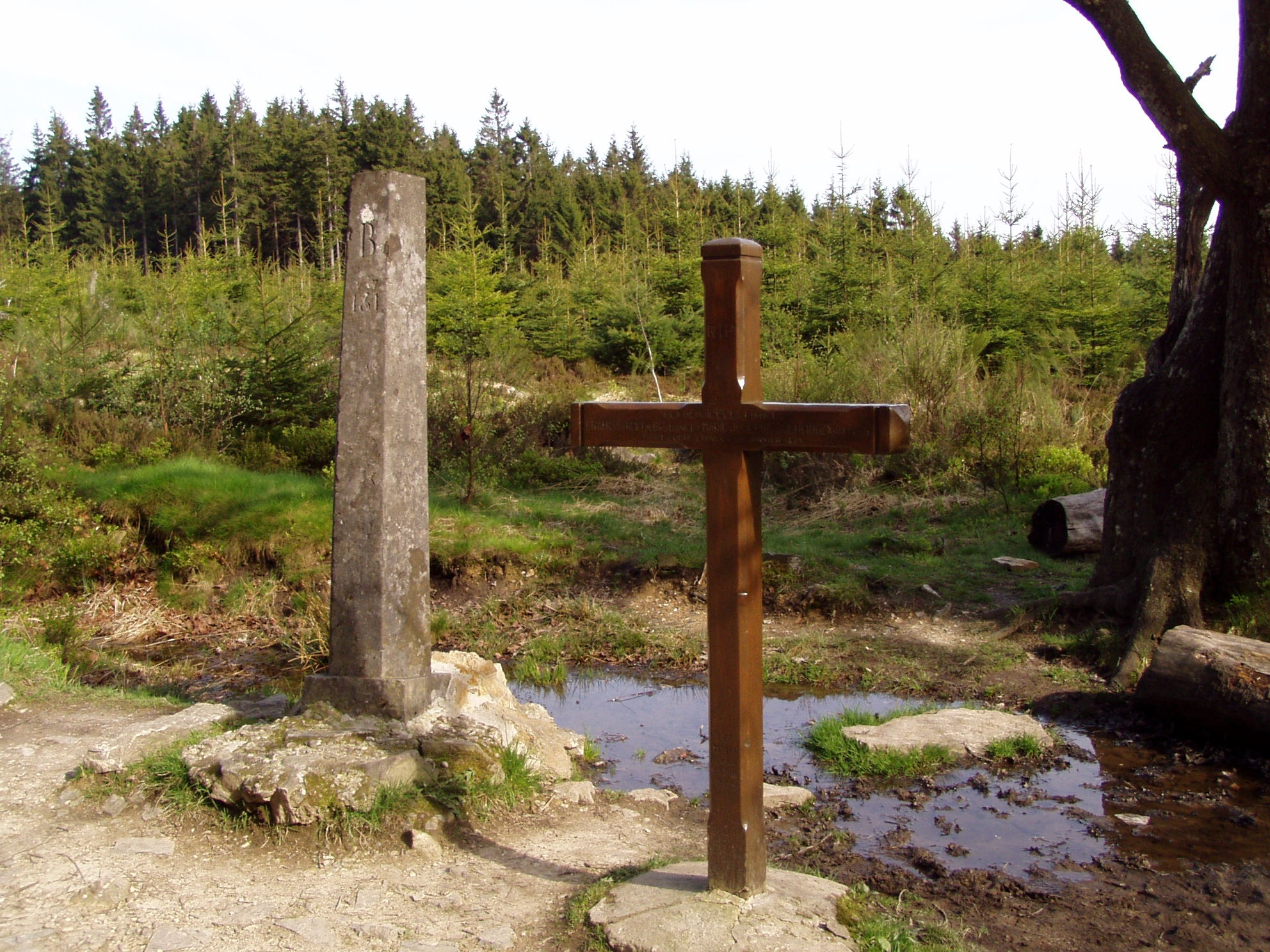 Belgique - Fagnes - La Croix des Fiancés avec une borne frontière Belgique-Prusse sur le chemin de la Vêquée Borne 151 Belgium-Prusse